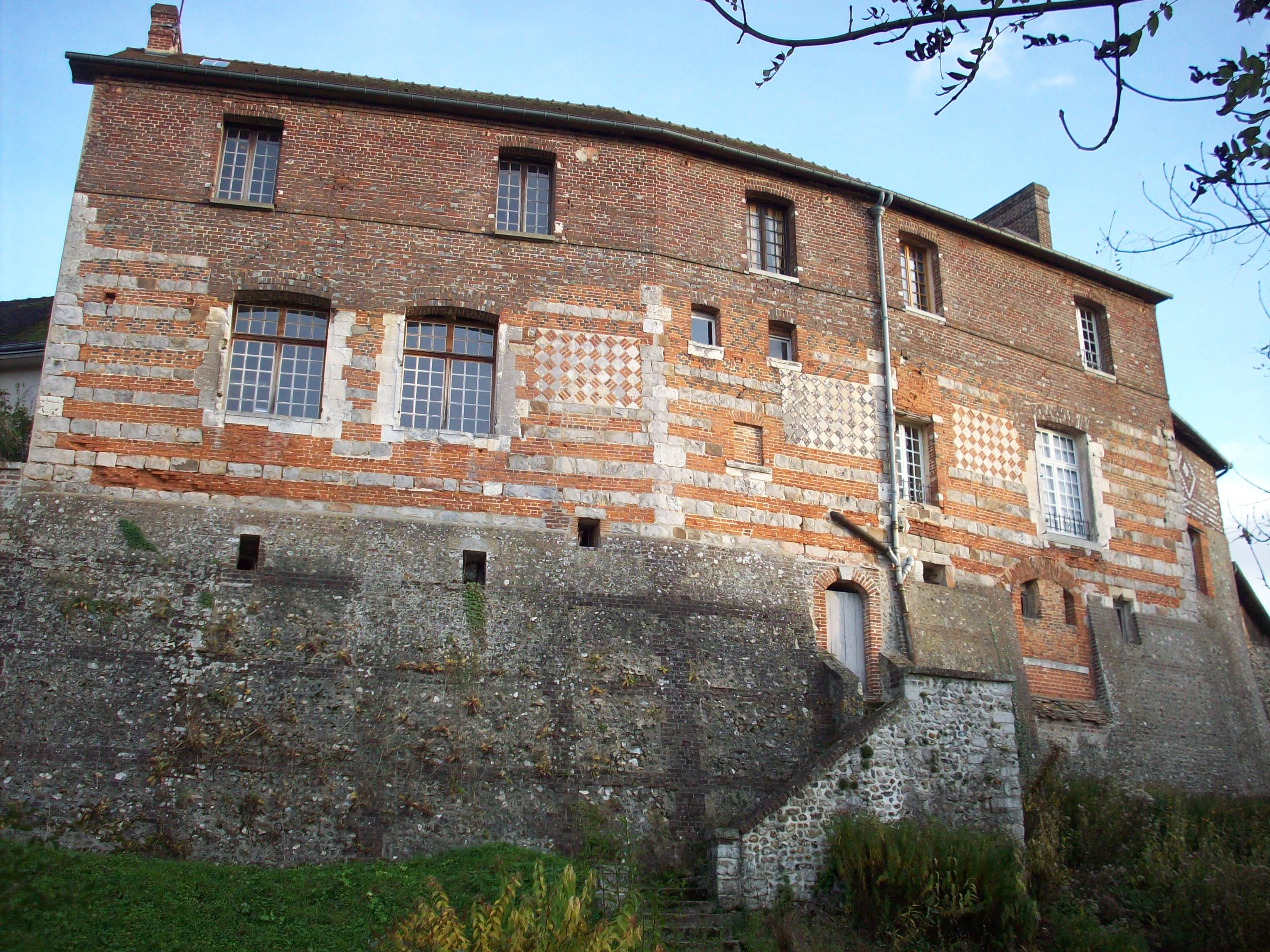 Vestiges de l'enceinte fortifiée du château et ancien couvent des bénédictines de Saint-Charles, aujourd'hui école communale.